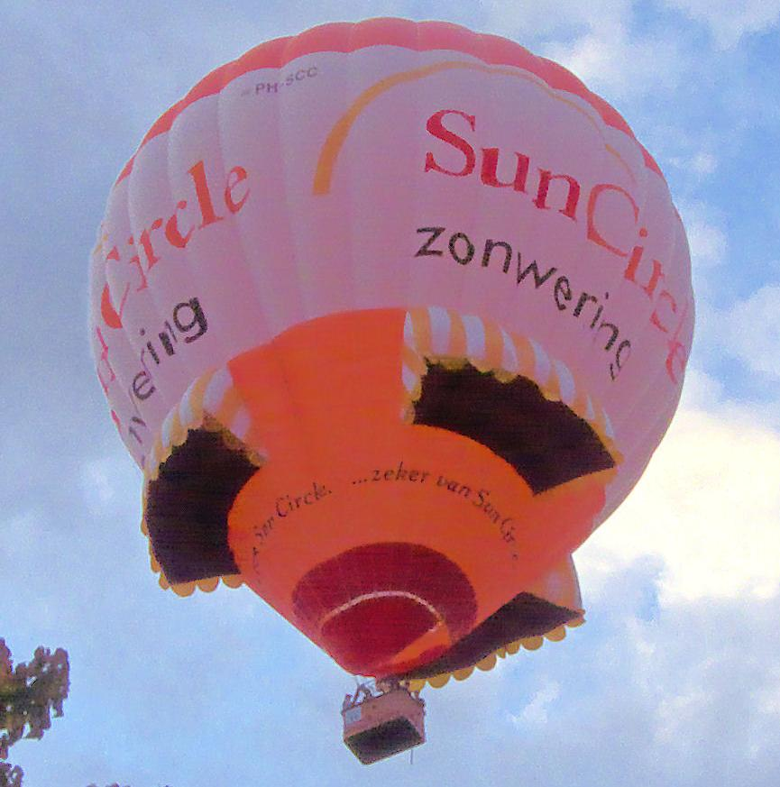 Hete luchtballon